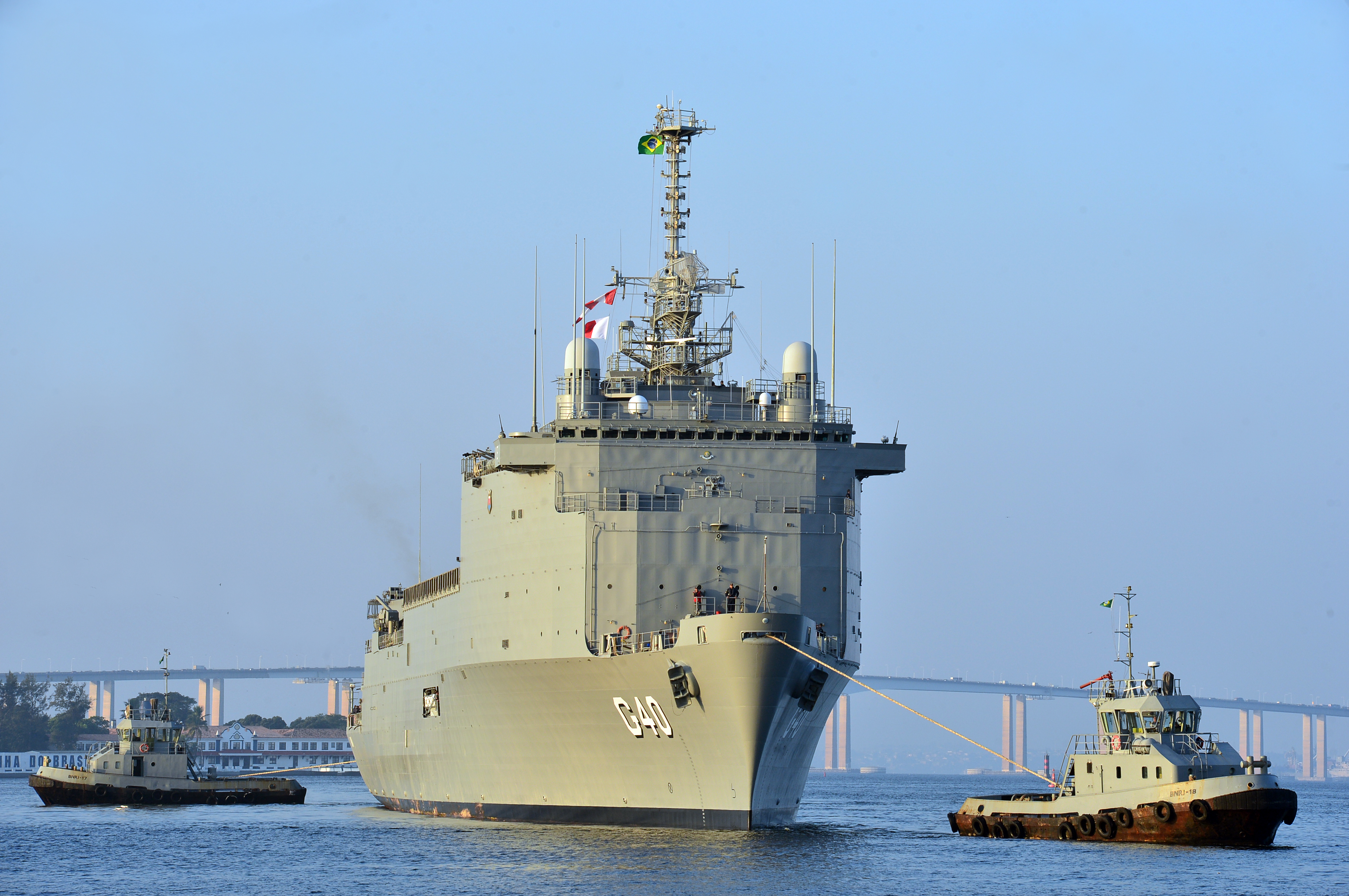 Ridex2018_39